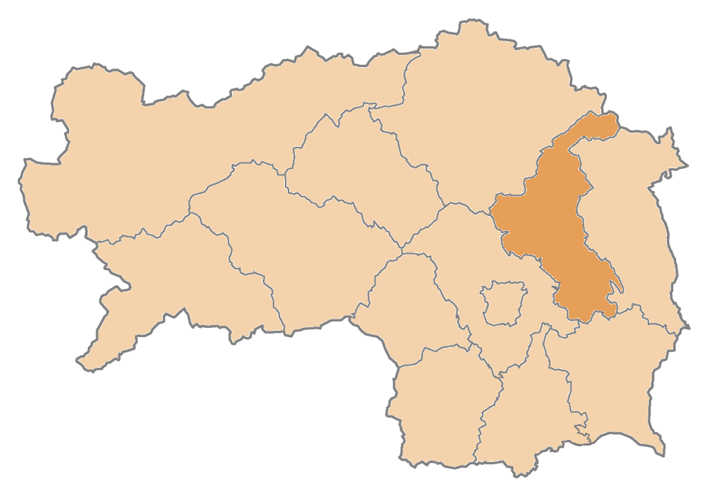 Karte: politischer Bezirk Weiz Lizenz: GNU FDL Quelle: Zeichnung plp Datum: de:2004 Ort: Wien